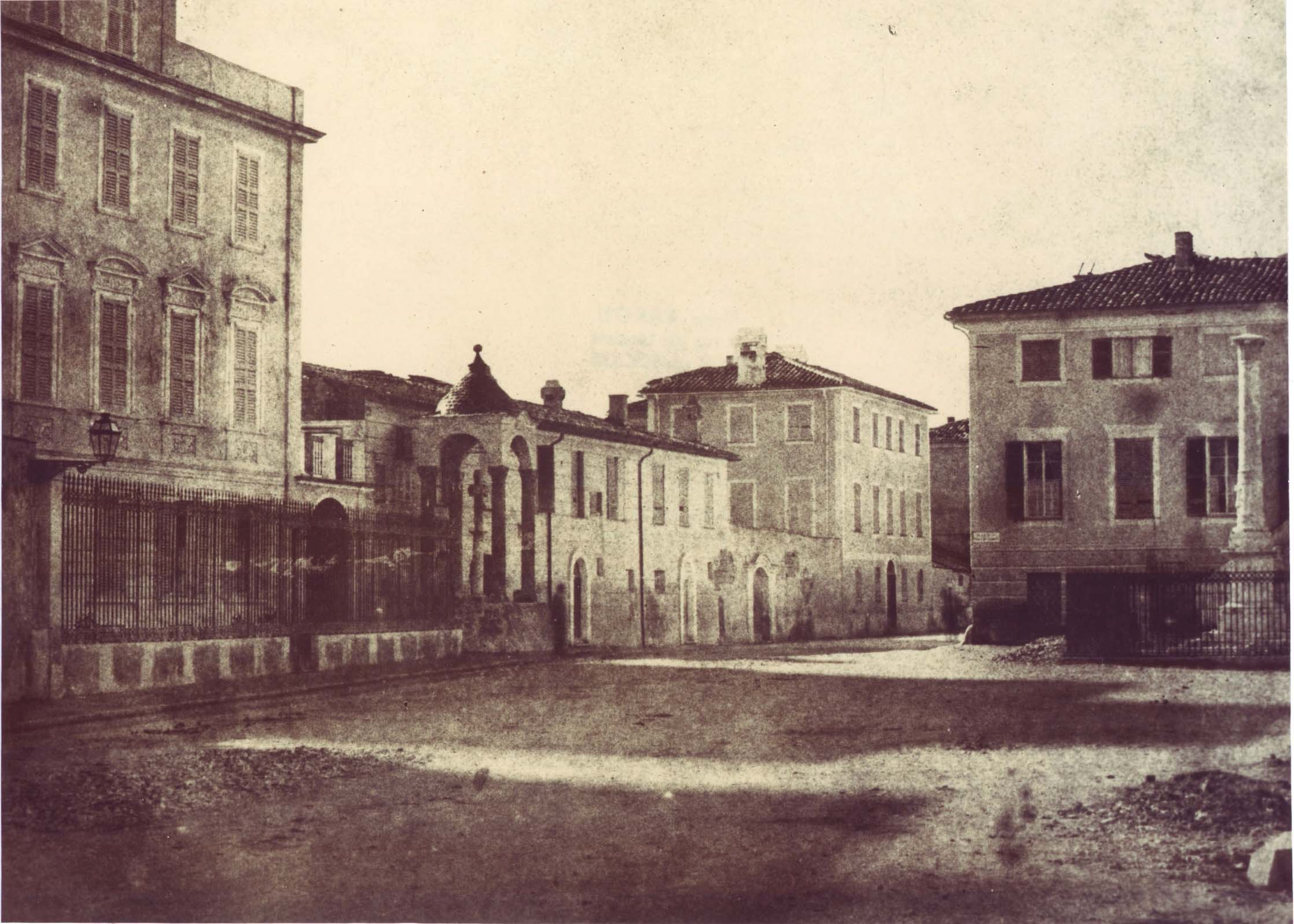 La Place croix de marbre dans le centre de Nice. Anonyme, 1865.